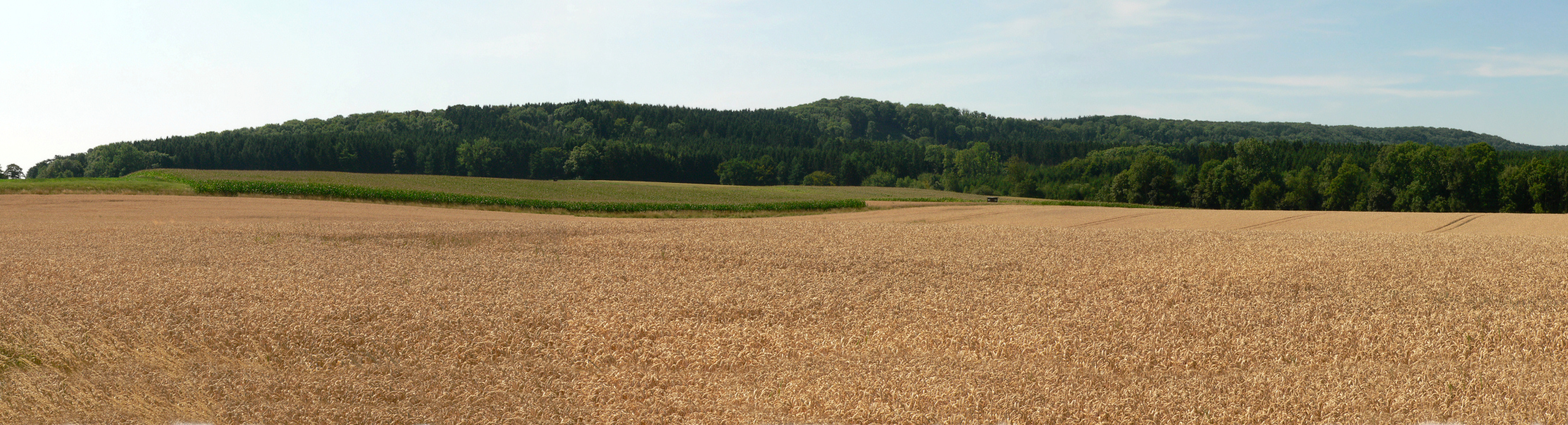 Harzhorn Nordostseite